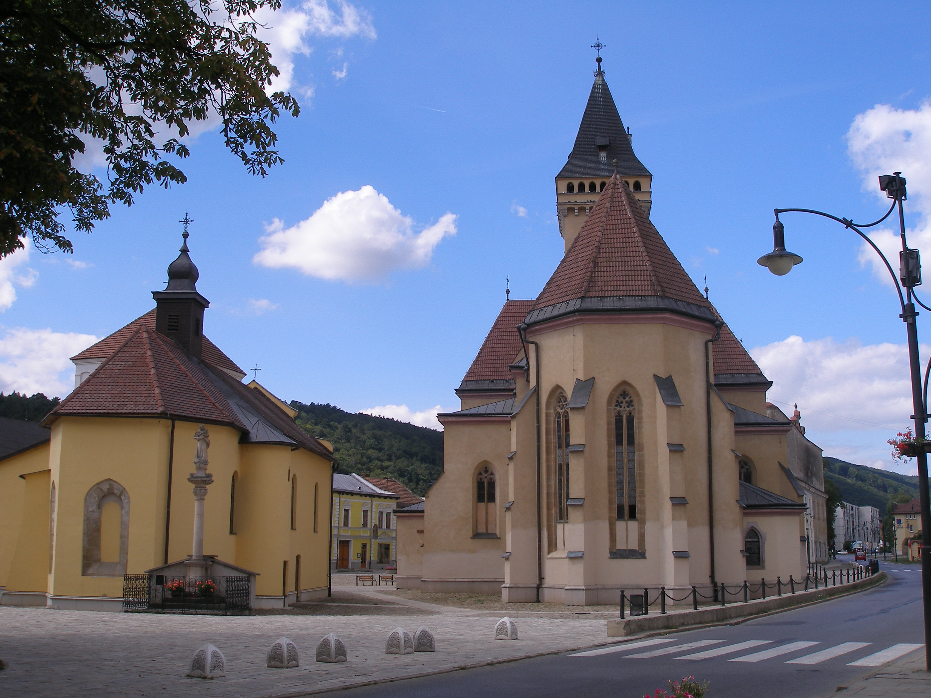 Sabinov starobylé bývalé slobodné kráľovské mesto na Slovensku. Dnes okresné mesto v regióne Šariš.